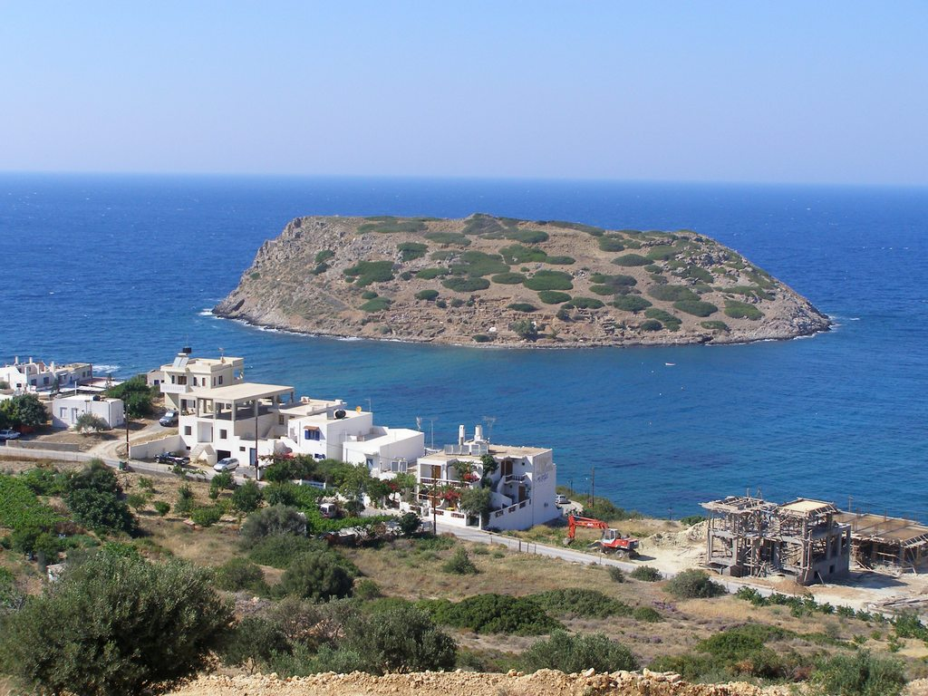 Die Insel Mochlos mit Ausgrabungen minoischer Siedlung, Nord-Ost-Kreta